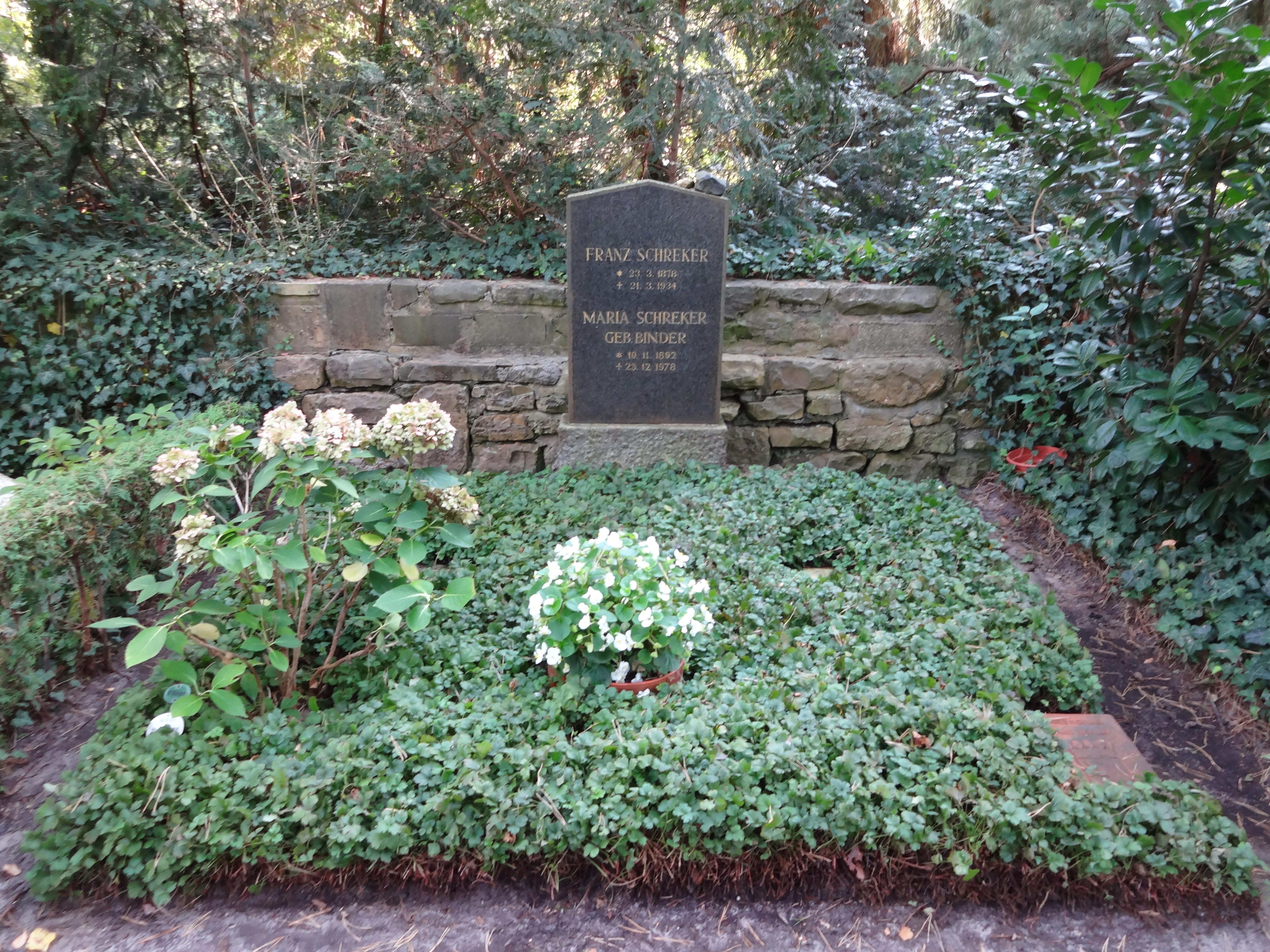 Ehrengrab von Schreker, Franz auf dem Waldfriedhof Dahlem, der Friedhof ist als Gartendenkmal der Stadt Berlin (Nr. 09045949)This is a photograph of an architectural monument.